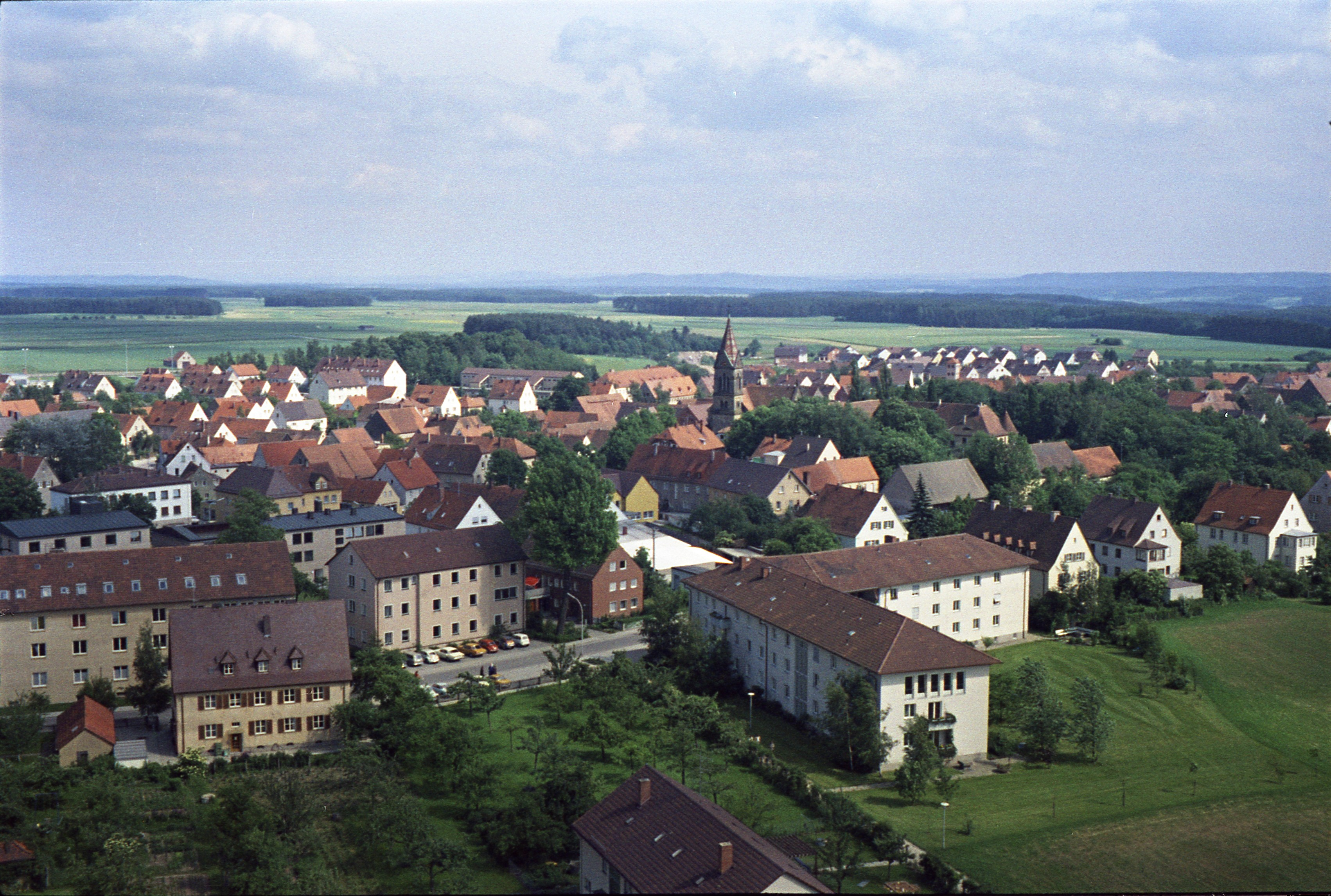 Neuendettelsau von der Laurentiuskirche aufgenommen, Blickrichtung Osten